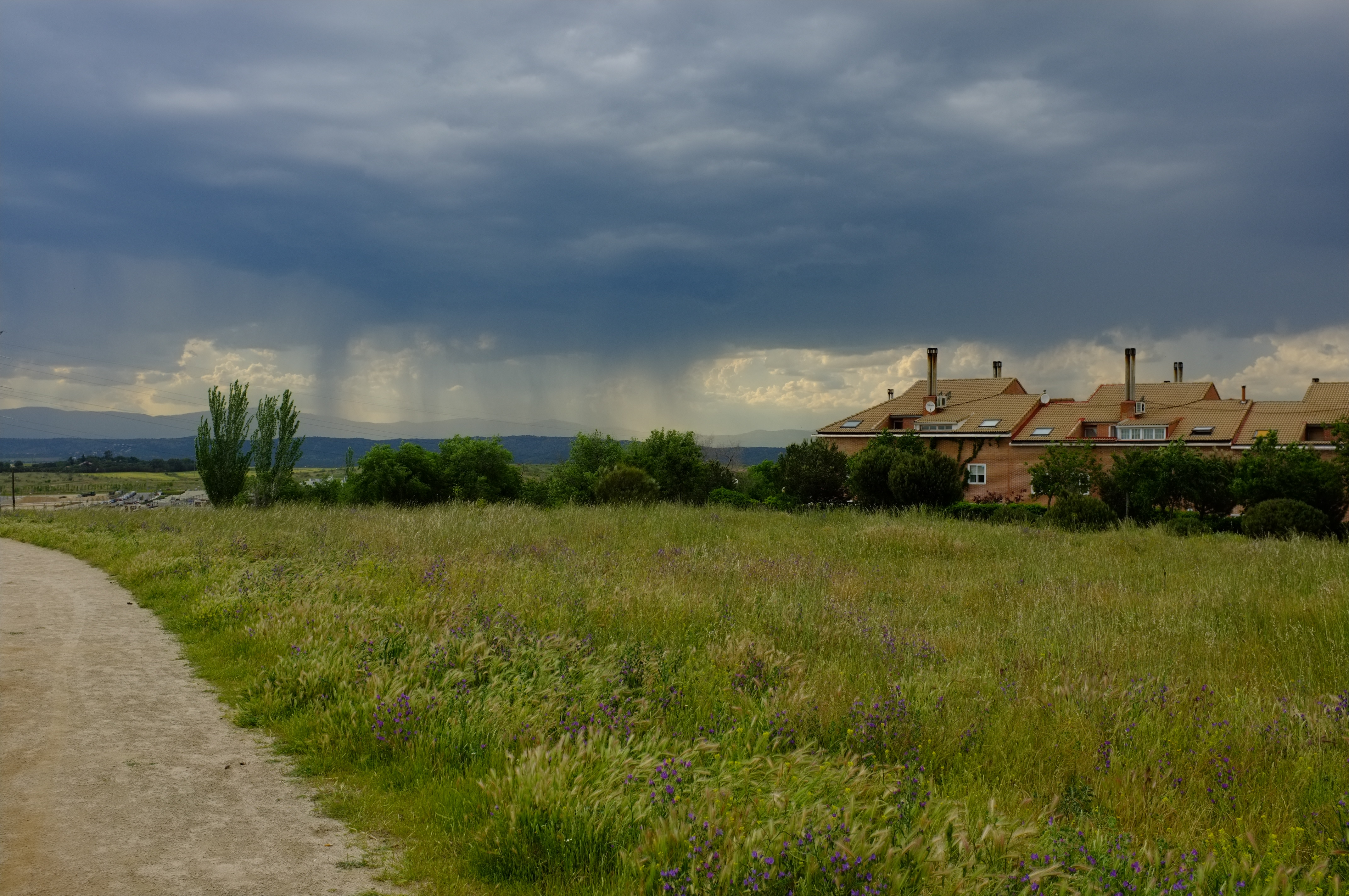 Lloviendo